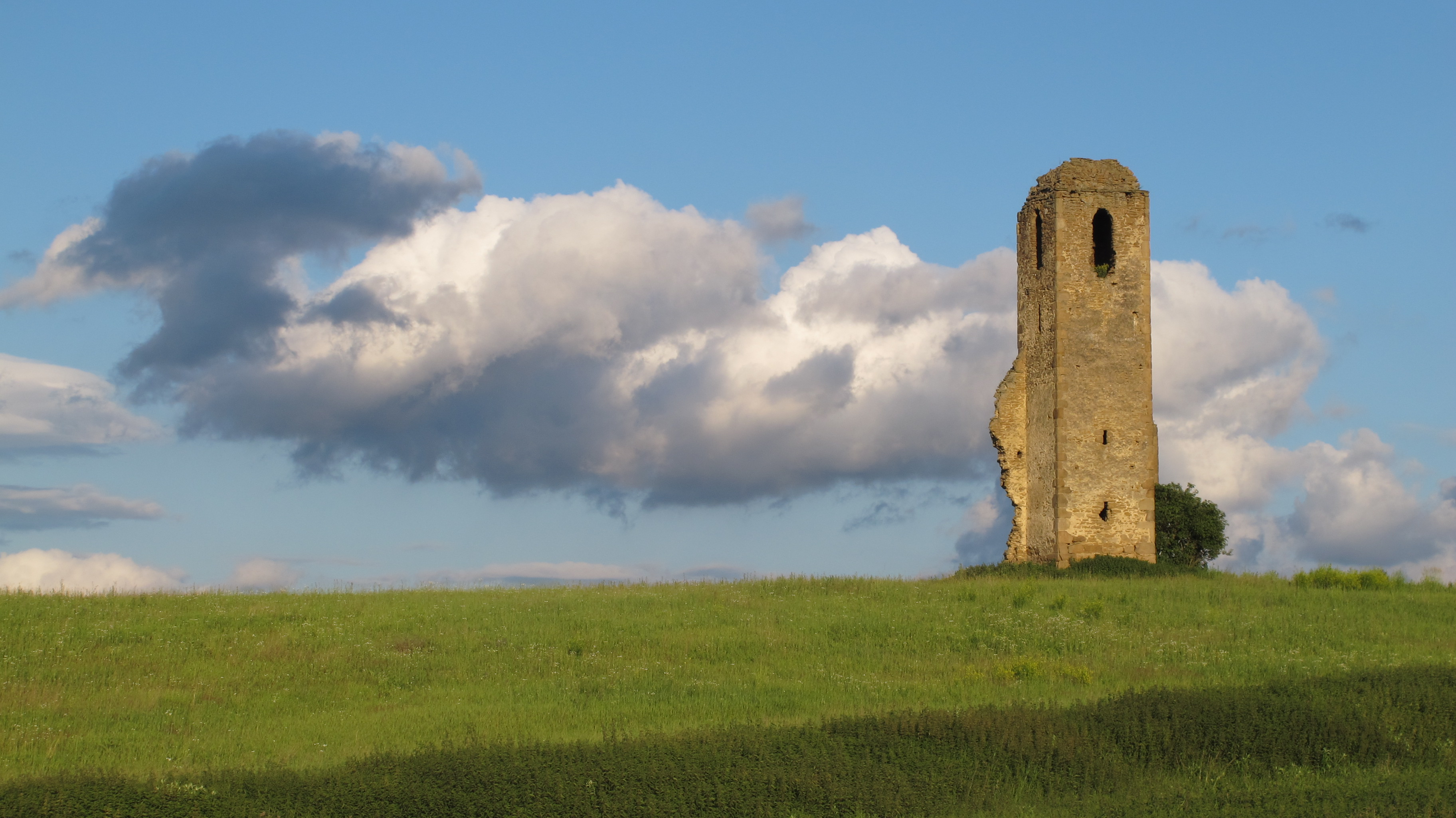 Ruina kostola sv. Stanislava zaniknutej osady Miloj